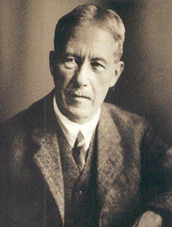 Porträtfotografie des Chirurgen Heinrich Braun